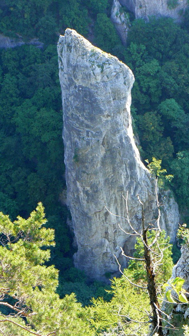 Cukrová homoľa je legendárny, asi 100 m vysoký, skalný, erózno-denudačný relikt pôvodného skalného reliéfu. Budujú ju masívne wettersteinské vápence. Z hľadiska geomorfológie patrí medzi tzv. skalné ihly. Nachádza sa približne v strede Zádielskej tiesňavy. V jej masíve sa vytvorilo niekoľko menších jaskýň. Jej vrchol je už vyše sto rokov cieľom horolezeckých výstupov.